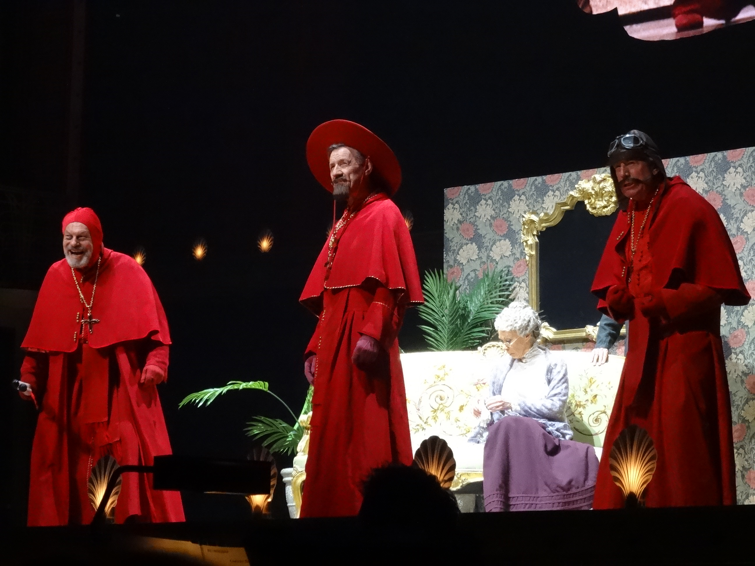 Photo 02-07-14 12 46 43